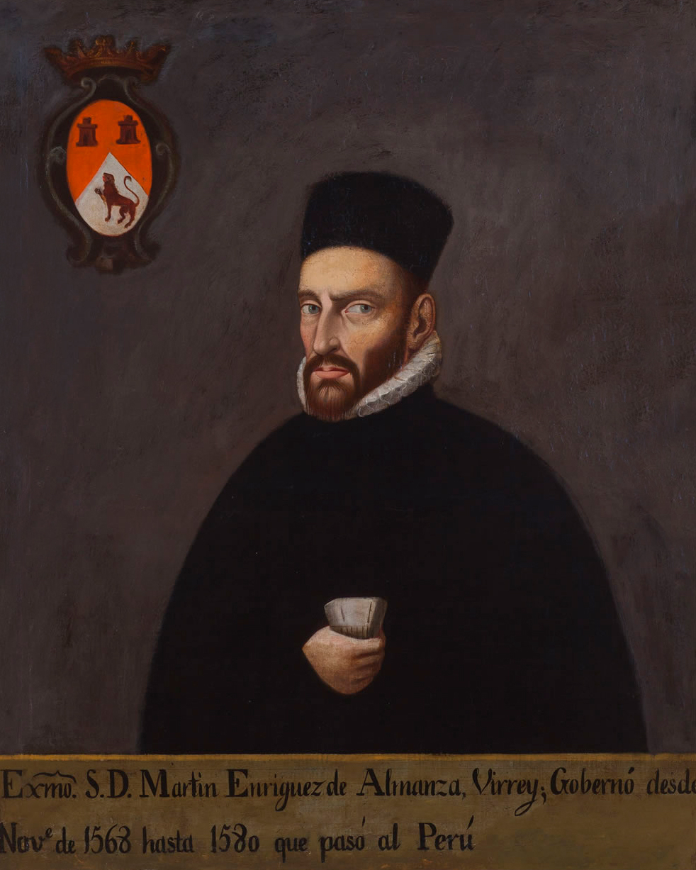 Don Martín Enríquez de Almanza, Virrey de Nueva España (1568-1580) y virrey del Perú (1581-1583)